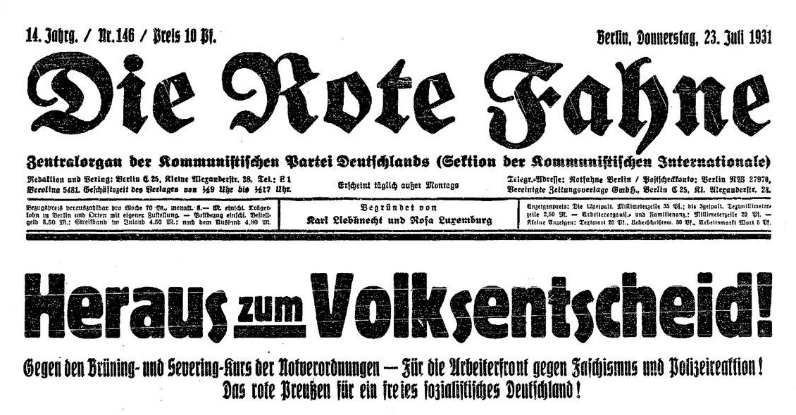 Die Rote Fahne del 23 luglio 1931 annuncia la partecipazione del Partito Comunista di Germania al plebiscito sullo scioglimento del Landtag prussiano del 9 agosto